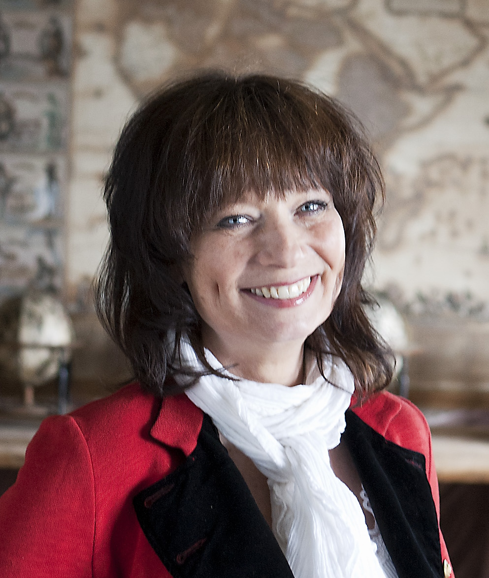 Eva Funck